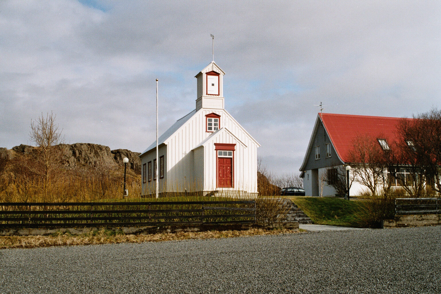 Es zeigt den Weiler Borg í Mýri bei Borgarnes in Island. Das Bild wurde von mir selbst im April 2004 aufgenommen und verletzt kein Copyright.